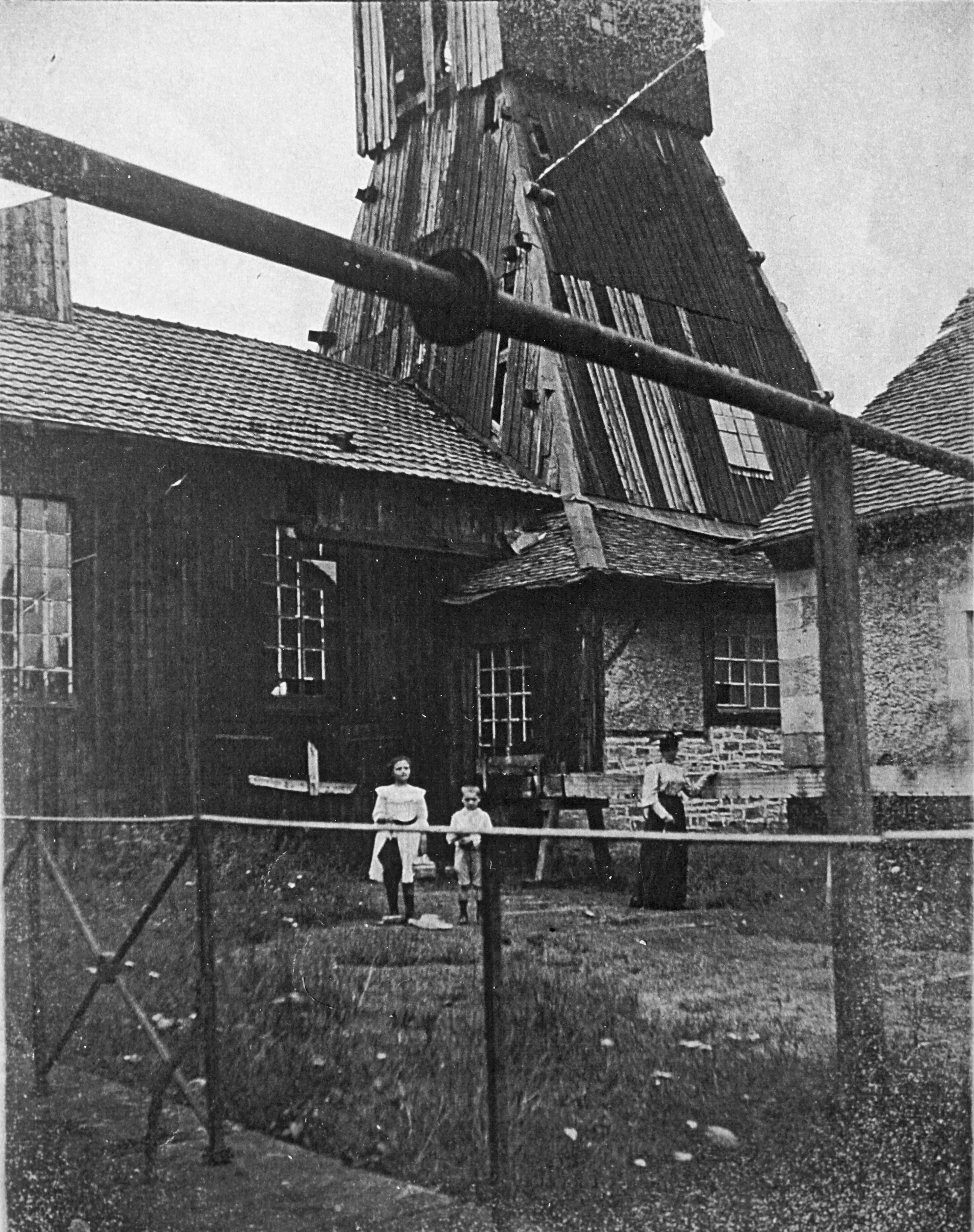 Vue du puits Notre-Dame des mines de Ronchamp.